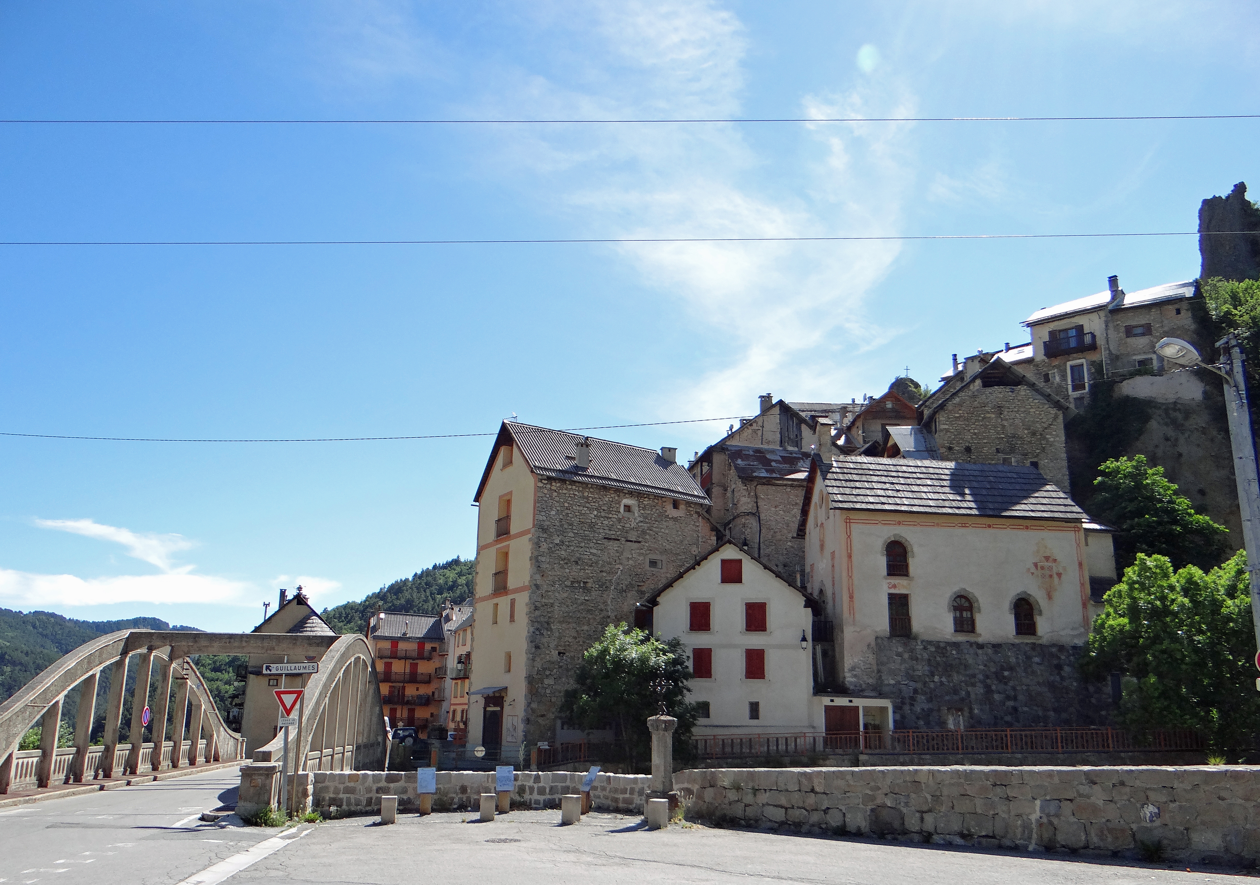 Péone - Entrée de la ville à partir de Valberg, pont sur le Tuébi et la chapelle des Pénitents